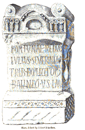 Altar für Fortuna, gestiftet vom Tribunen Julius Severinus, Tribun der Raeti Gaesati, gefunden in Risingham, im Lagerbad an der SO-Ecke, 3. Jahrhundert n.Chr.